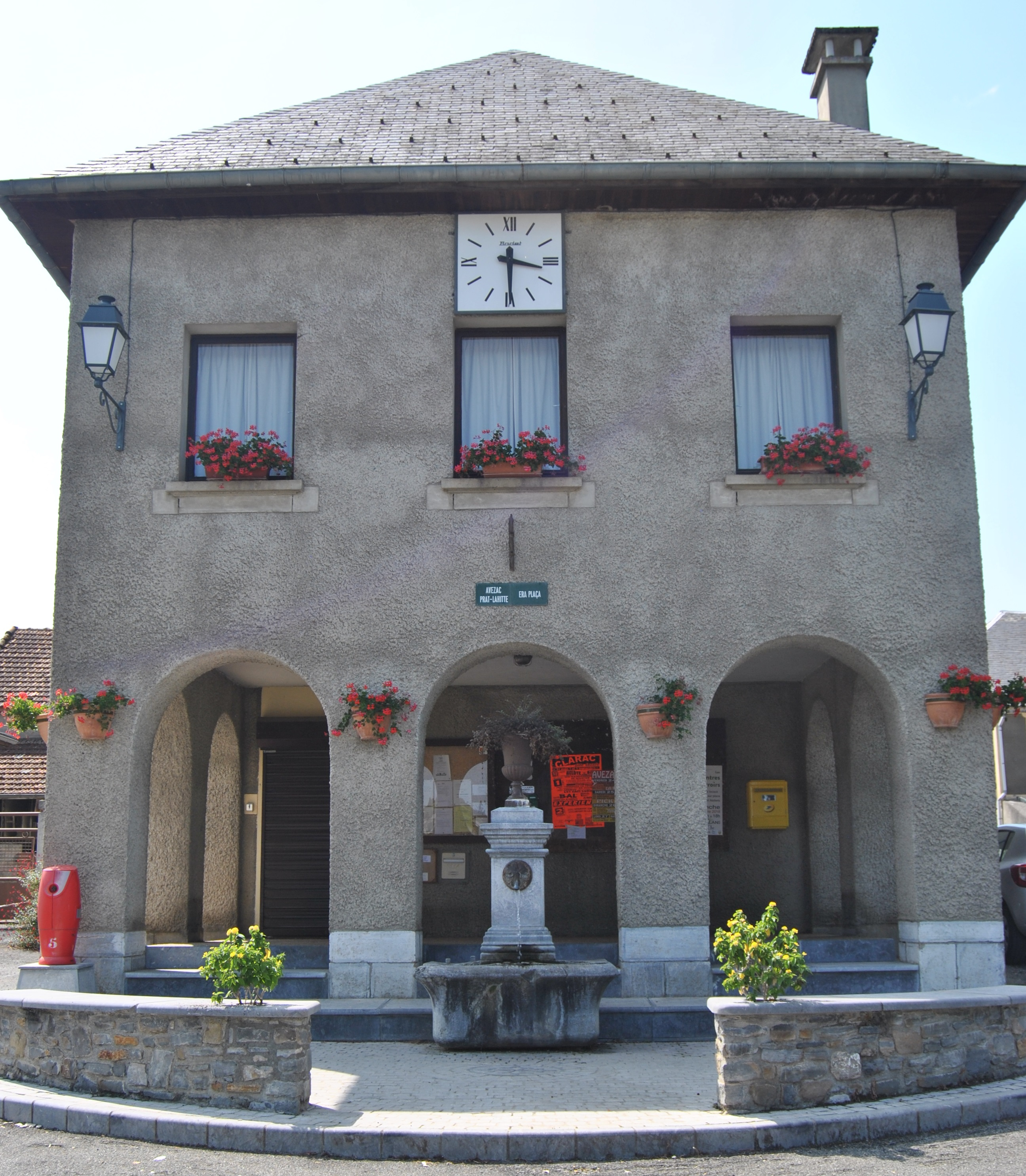 Mairie AV-P-L